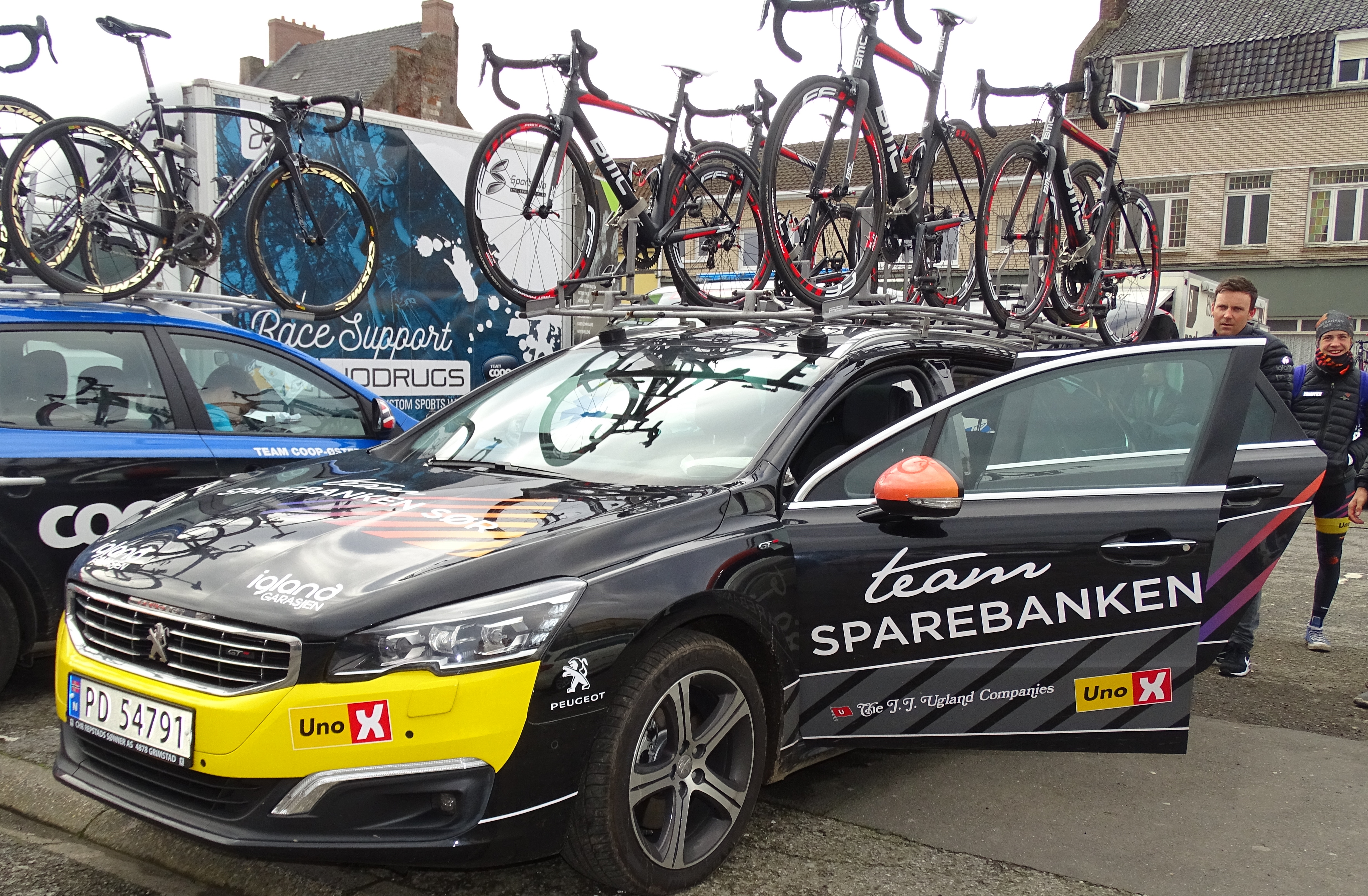 Reportage réalisé le dimanche 6 mars à l'occasion du départ et de l'arrivée du Grand Prix de Lillers-Souvenir Bruno Comini 2016 à Lillers, Pas-de-Calais, Nord-Pas-de-Calais, France.